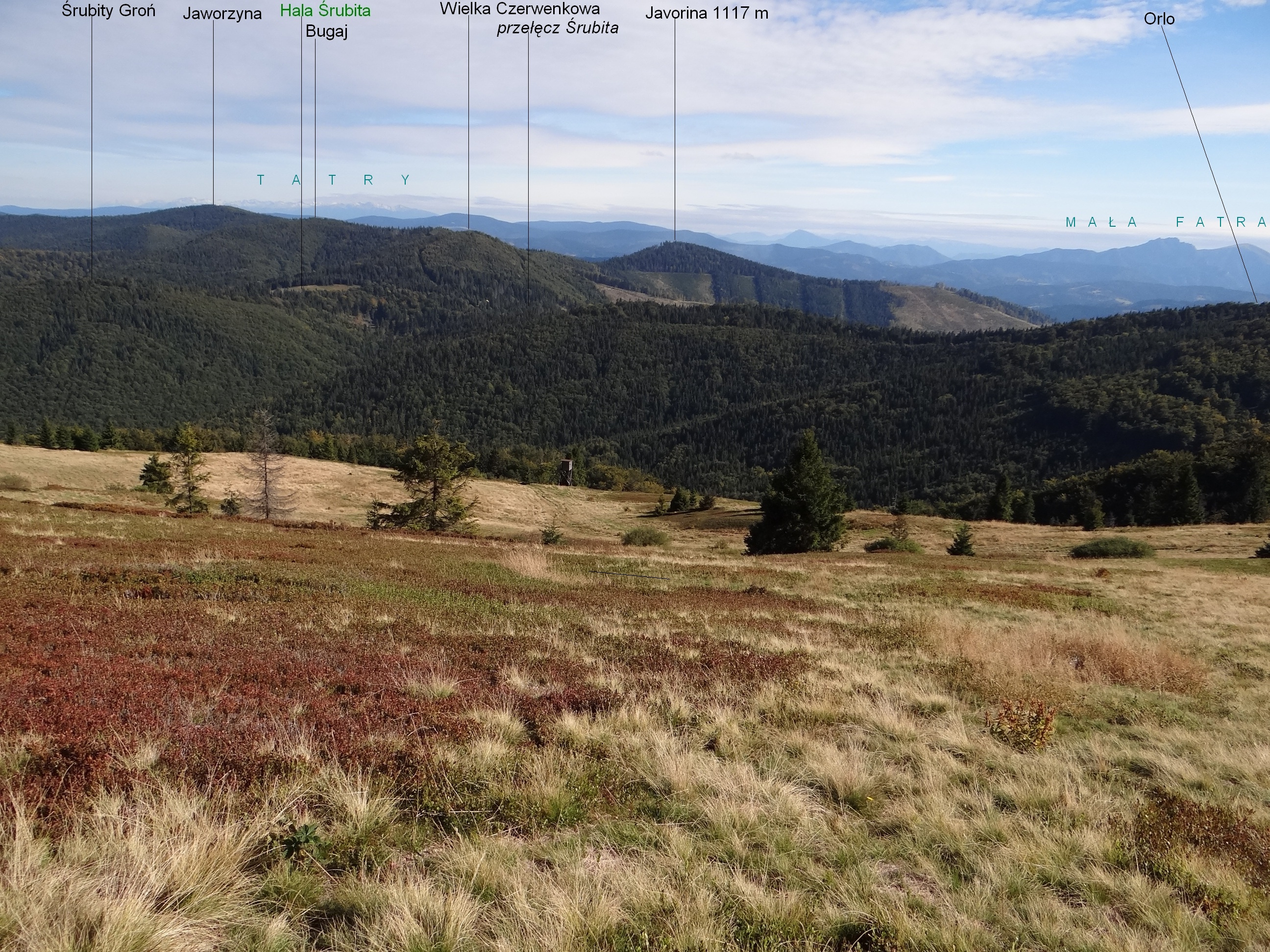 Widok z Hali na Małej Raczy